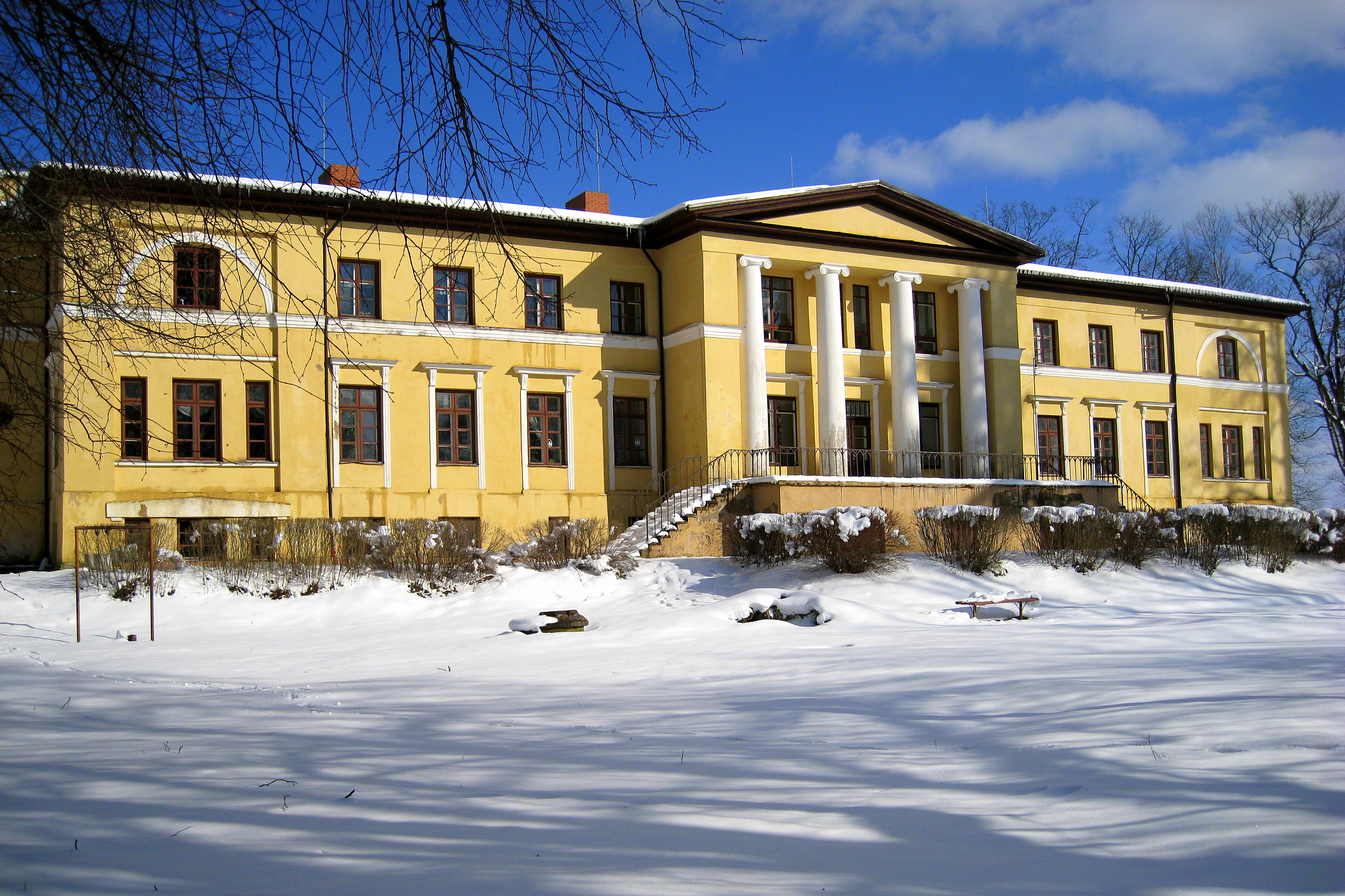 Tāšu-Padures manor